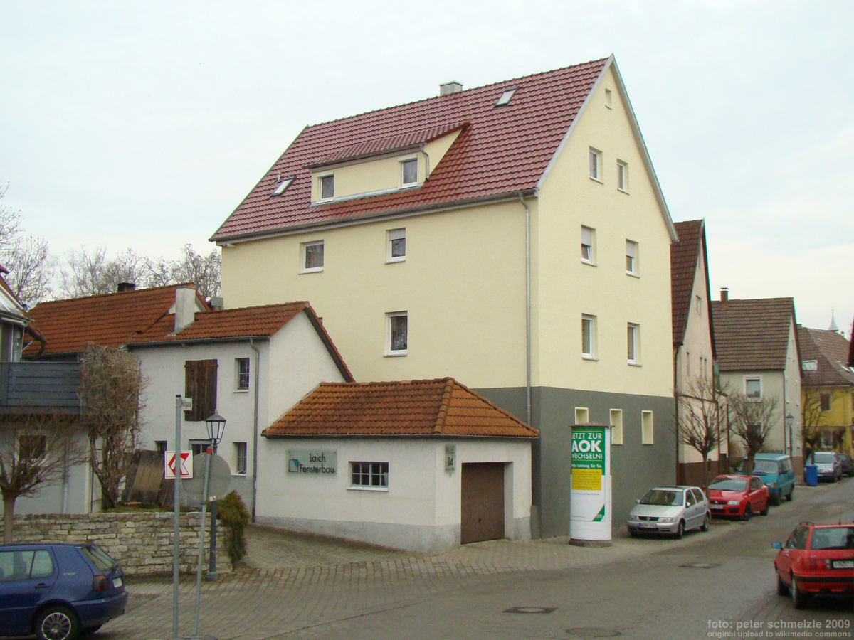 Ehemalige Synagoge in Bad Friedrichshall-Kochendorf, Mühlstr. 12